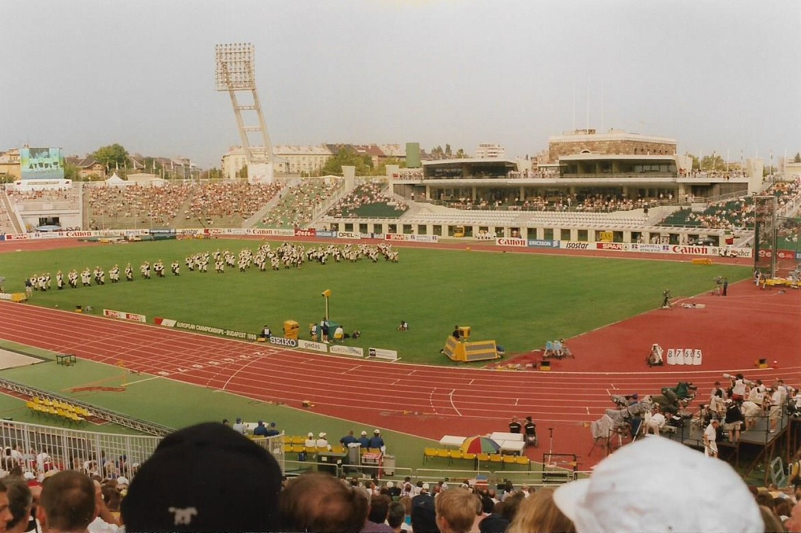 Yleisurheilun EM-kilpailujen avajaiset Népstadionilla Budapestissa 18. elokuuta 1998.